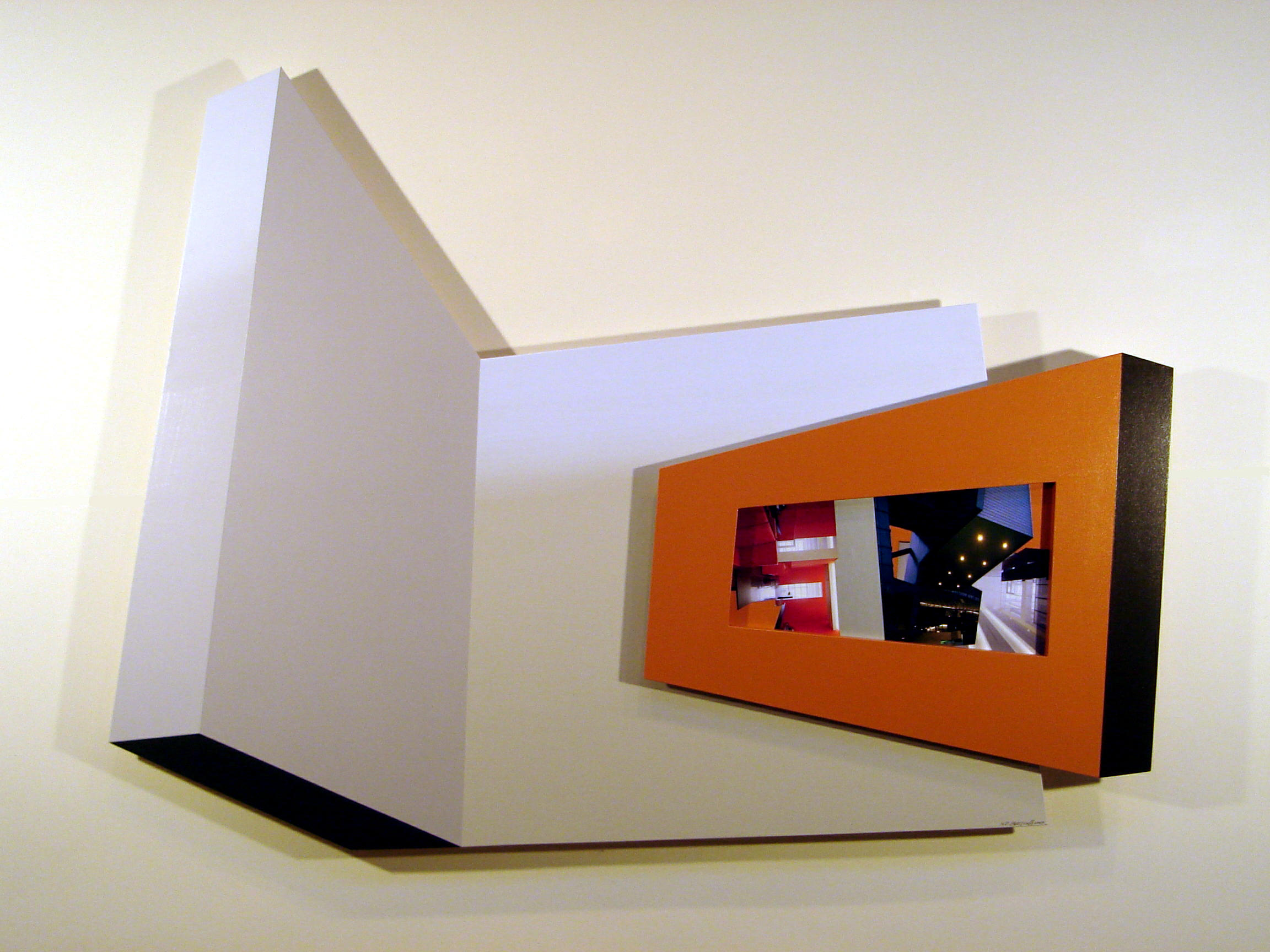 Werk 28-2007